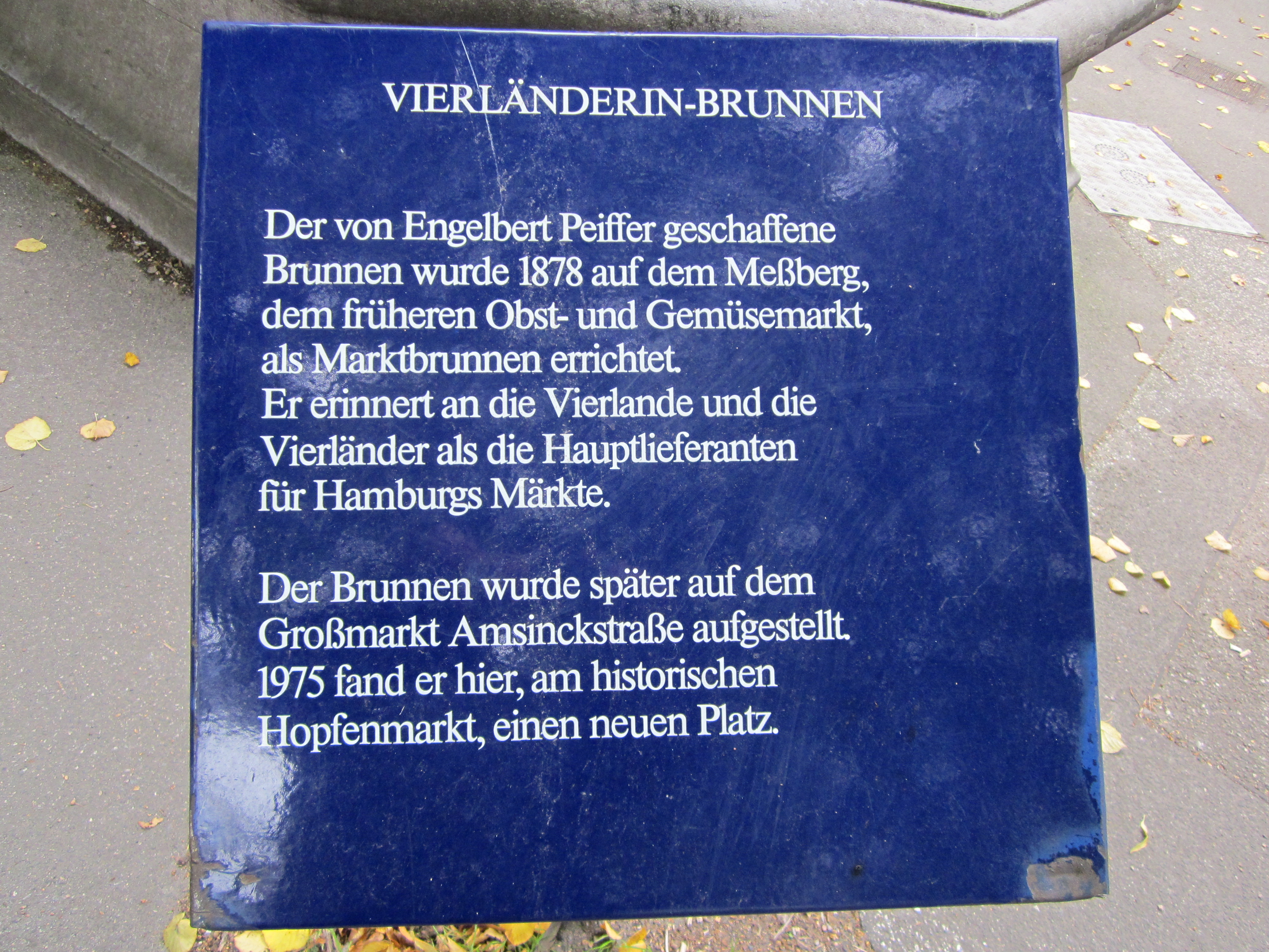 Tafel am Vierländerin-Brunnen auf dem Hopfenmarkt in der Hamburger Altstadt.